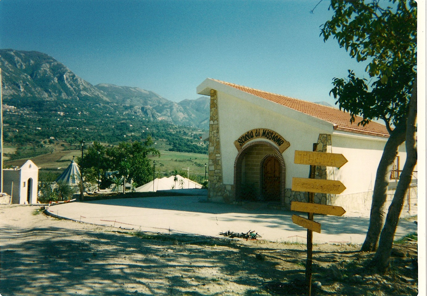 Il centro Pilgrim Parkin del gruppo itinerante Cristo è la Risposta